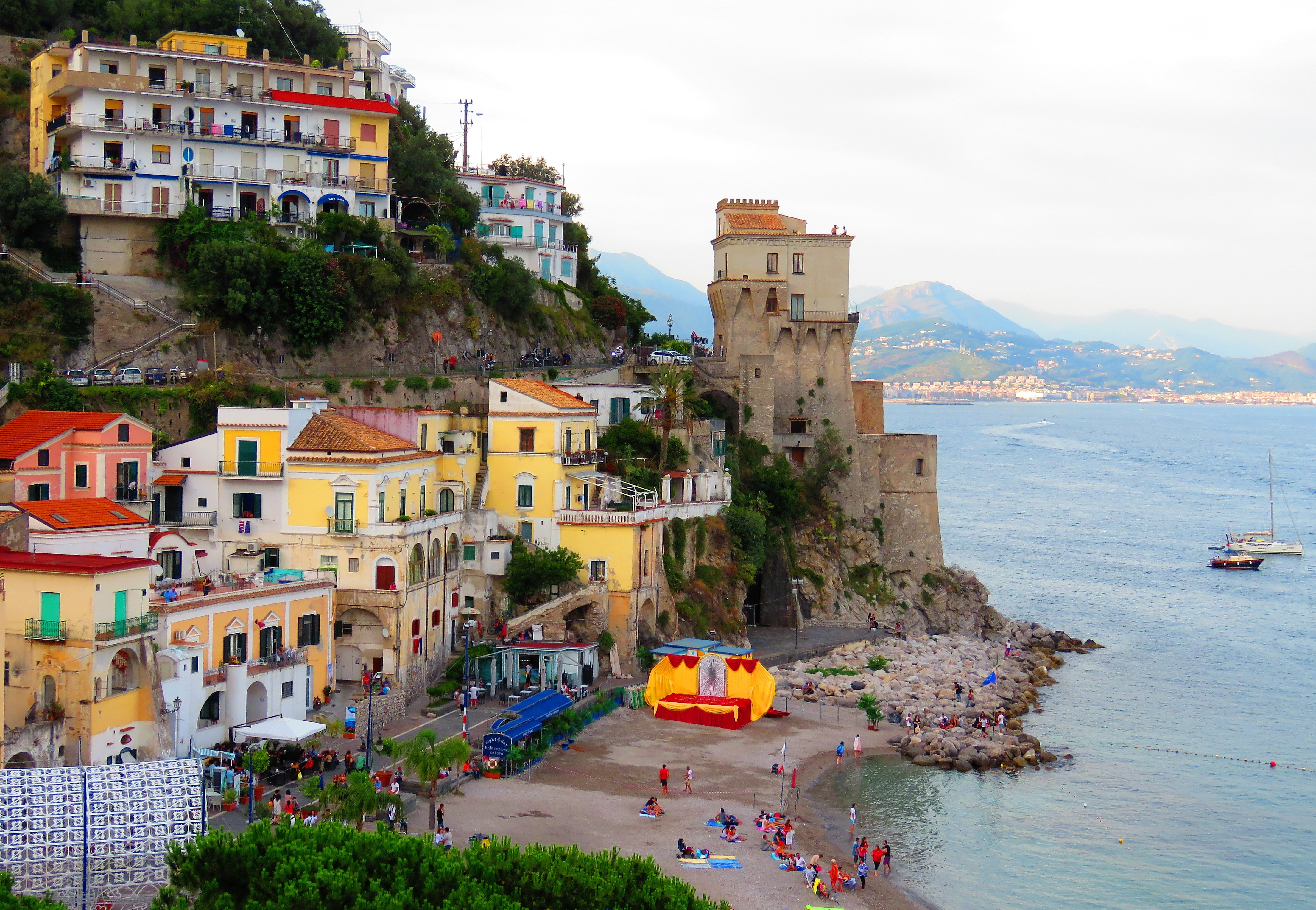 Torre di Cetara, in Campania.